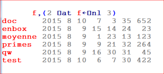 Usage de quad-AT pour documenter les fonctions